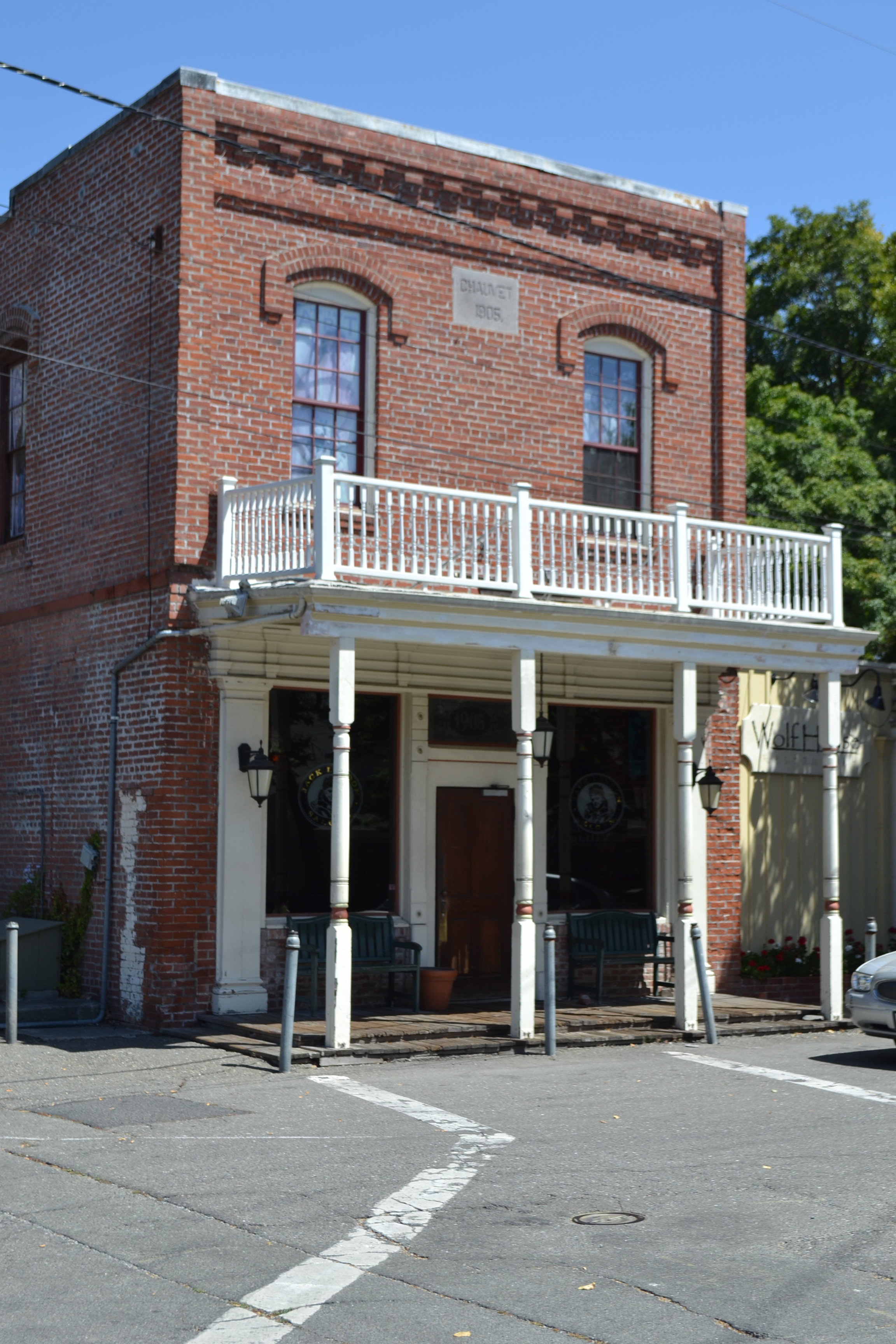 Bar Chauvet à Glen Ellen (Californie).